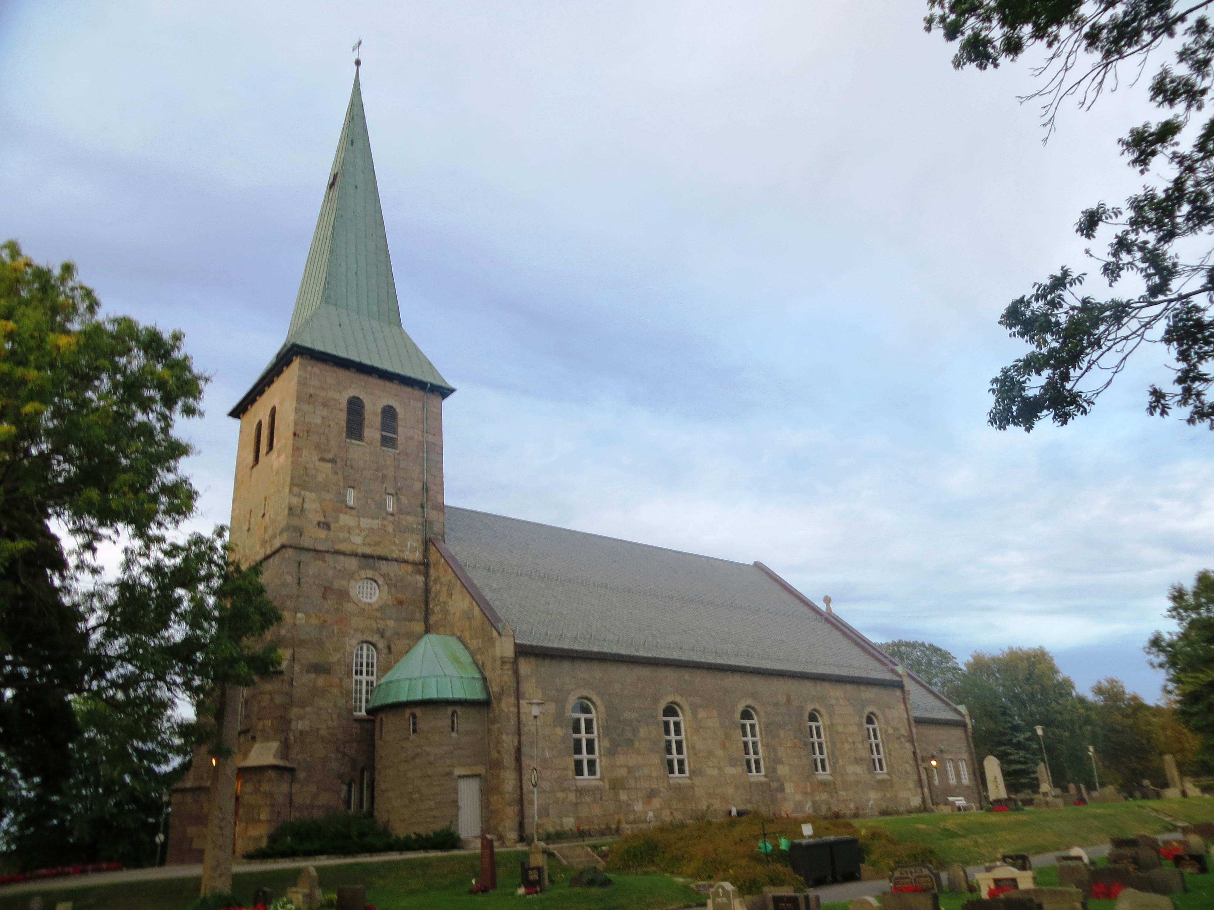 Tune kirke ved Sarpsborg. Kirkestedet er fra middelalderen, mens den nye kirka er bygget i første tiår av 1900-tallet.